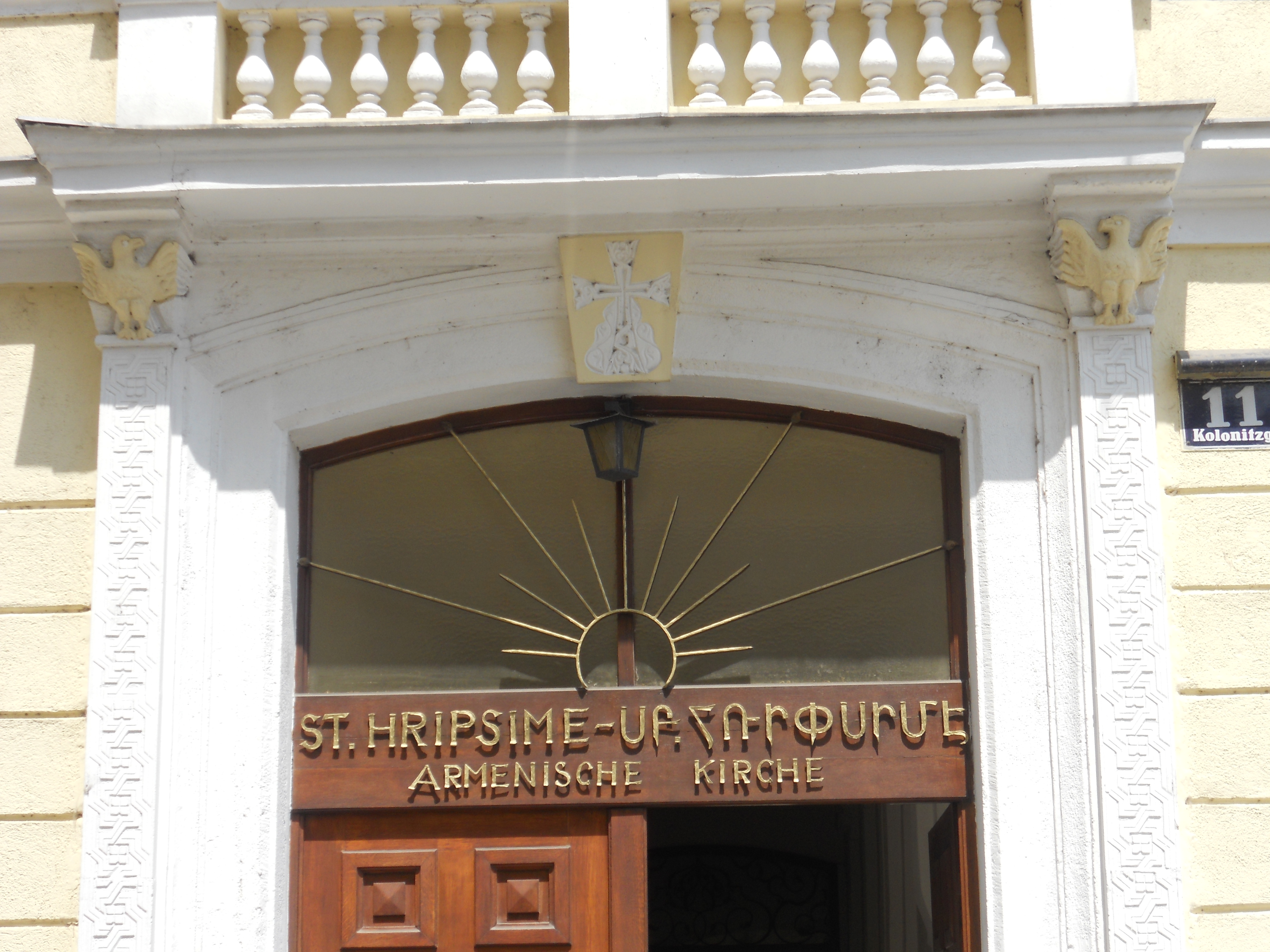 Tor des Hauses Kolonitzgasse 11, das auf die im Hof befindeliche armenische Kirche verweist